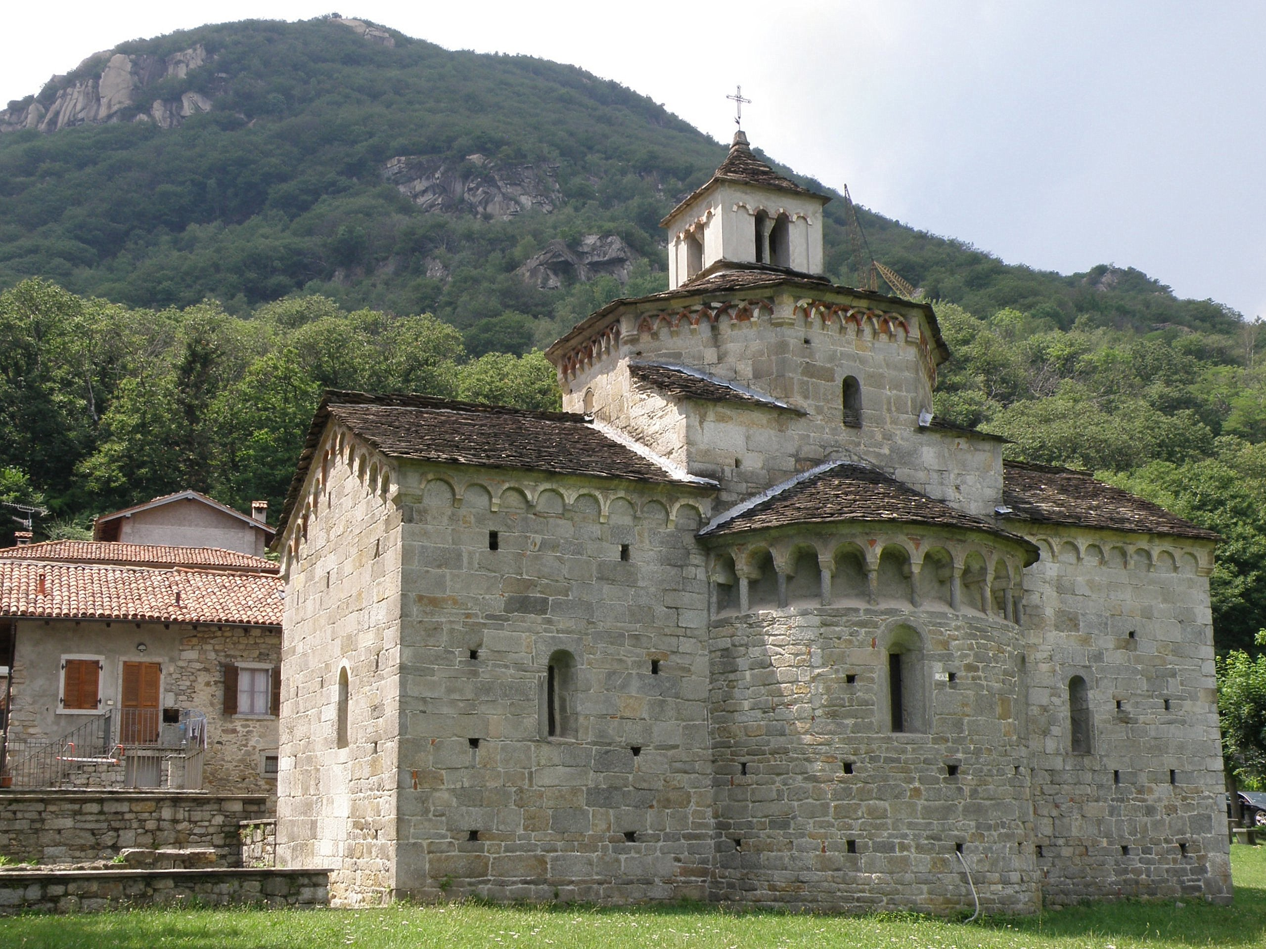 Mergozzo (VB). Chiesa di San Giovanni Battista (XII secolo) nella frazione di Montorfano. Transetto e abside. Sullo sfondo, il Monte Orfano (alt. 794m).